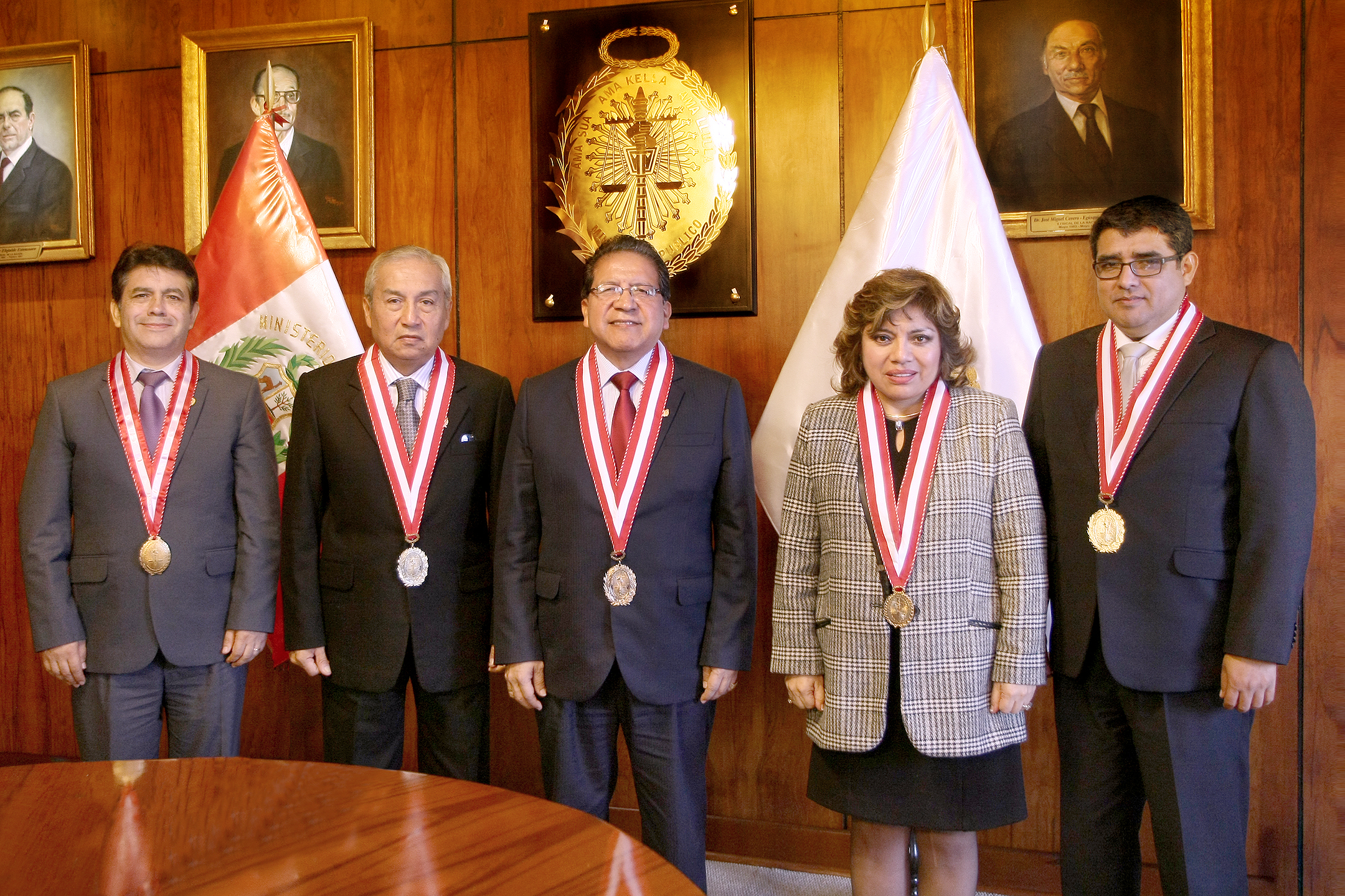 Fiscal de la Nación preside Junta de Fiscales Supremos. Pedro Chávarry, Pablo Sánchez, Zoraida Ávalos, Tomas Gálvez Villegas y Víctor Rodríguez.